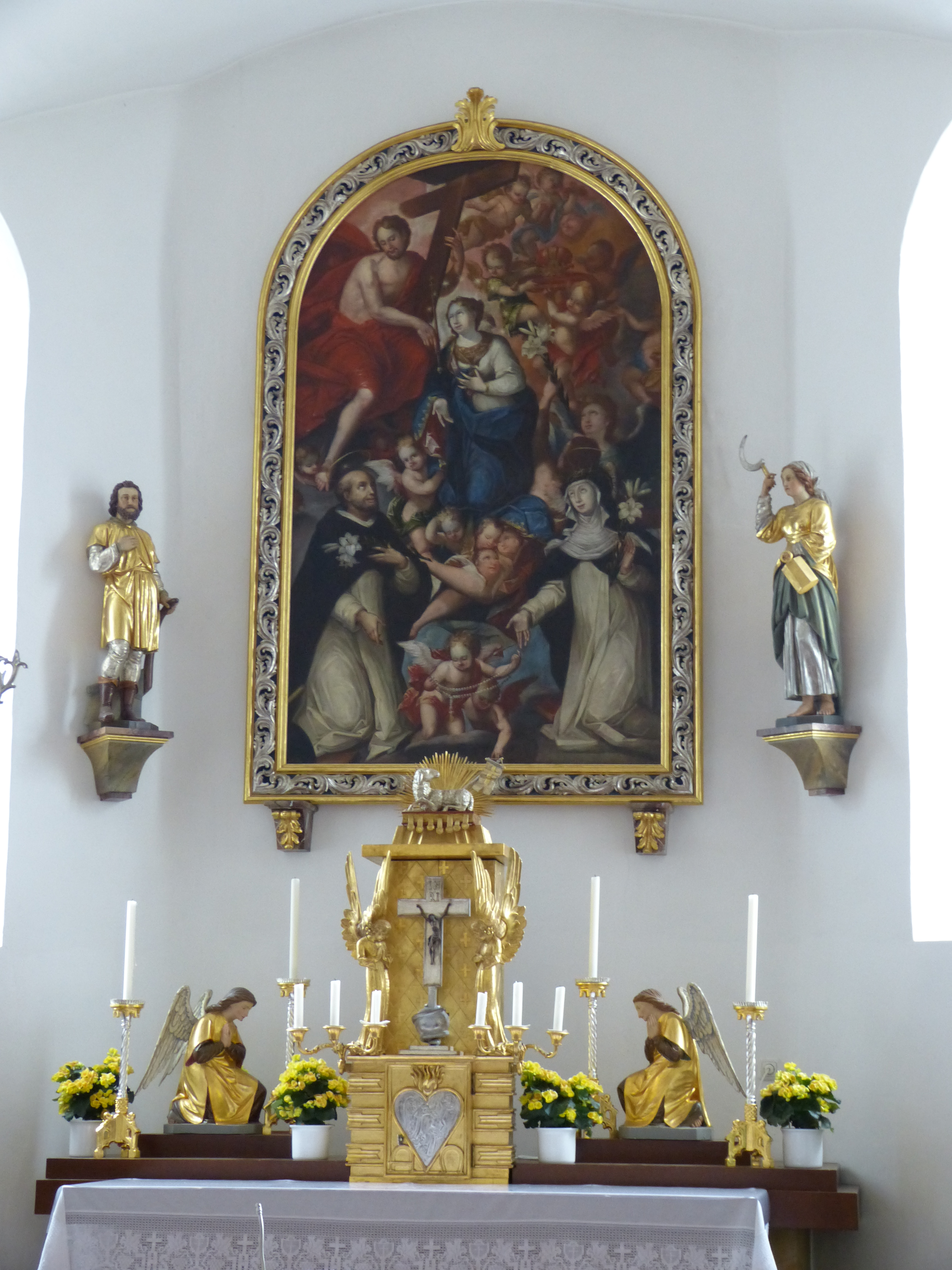 St. Stephanus, Köngetried, Landkreis Unterallgäu, Bayern